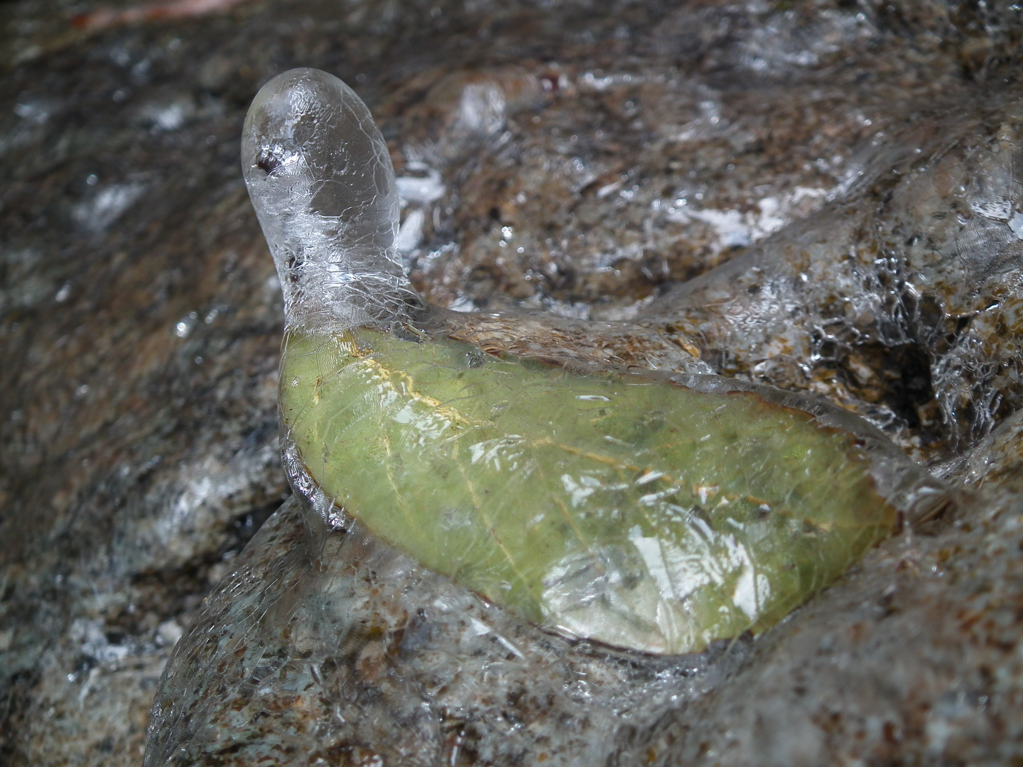 Katsuo Fudoson,Mt.Shibire 勝尾不動尊修験滝 神戸市北区淡河町 シビレ山